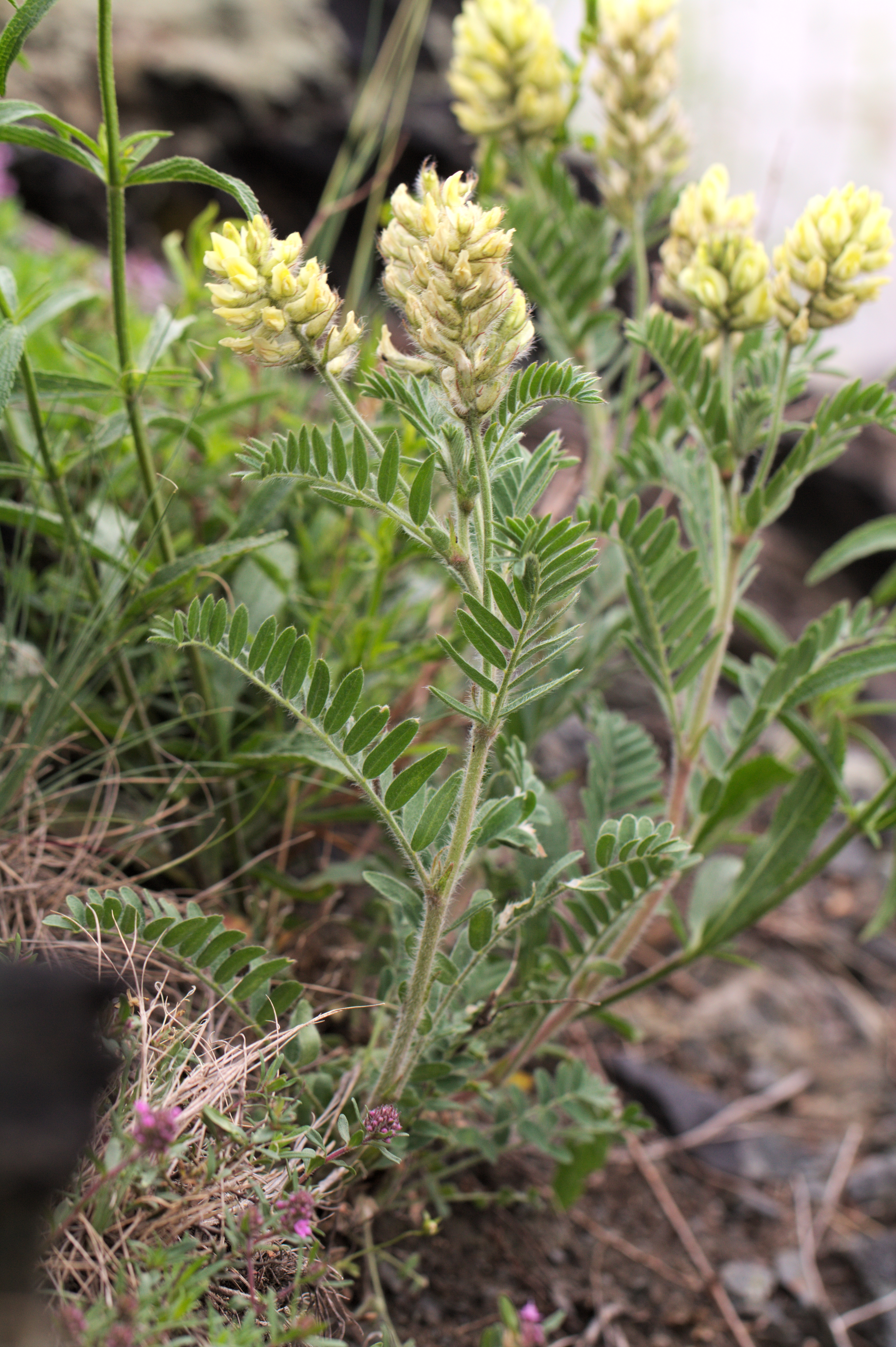 Kalvárie (přírodní rezervace) - jaro - Oxytropis pilosa (L.) DC., vlnice chlupatá - status ohrožení v ČR: C3 (ohrožený)